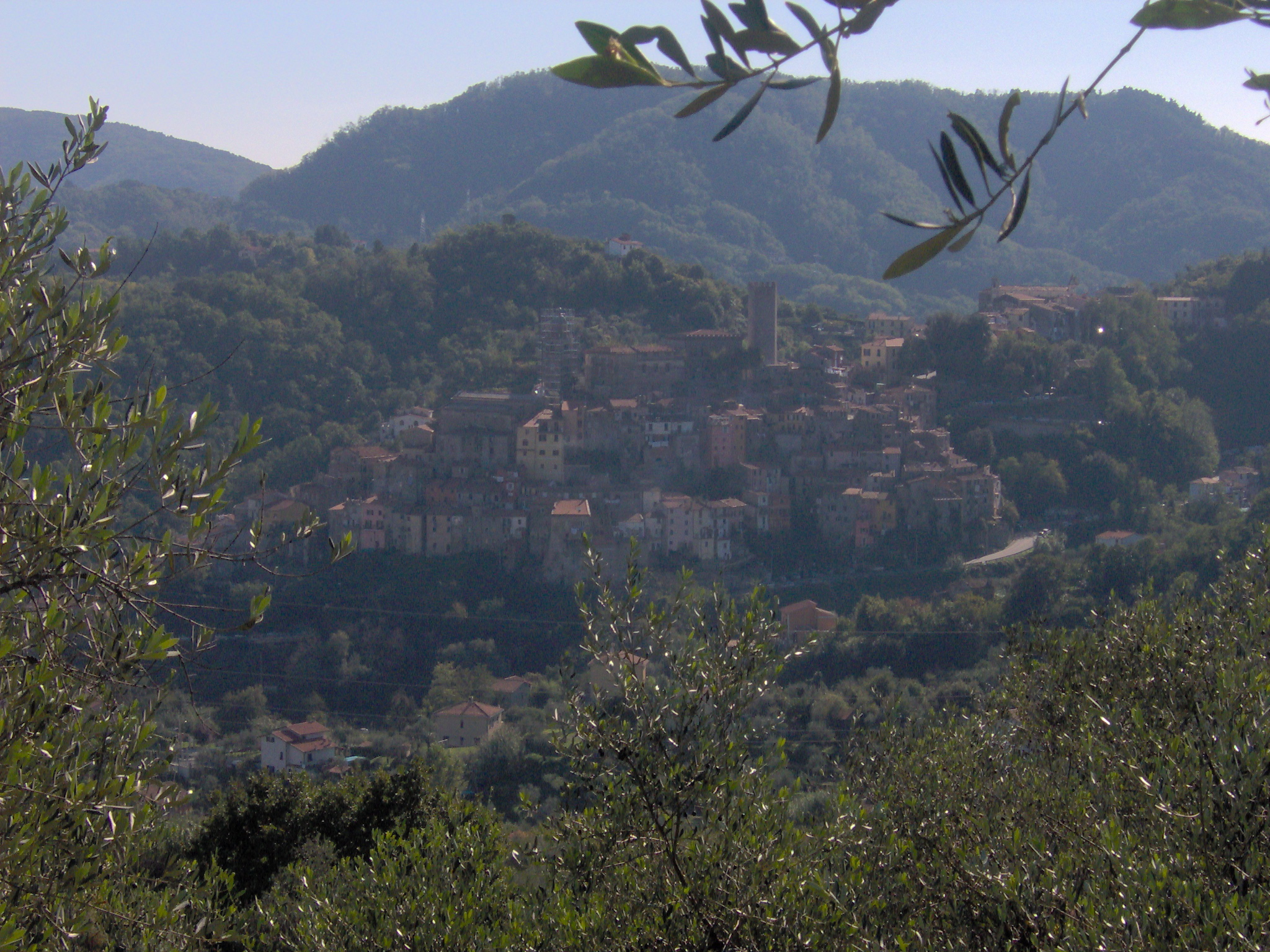 Il borgo di Arcola (SP) fotografato da Masignano